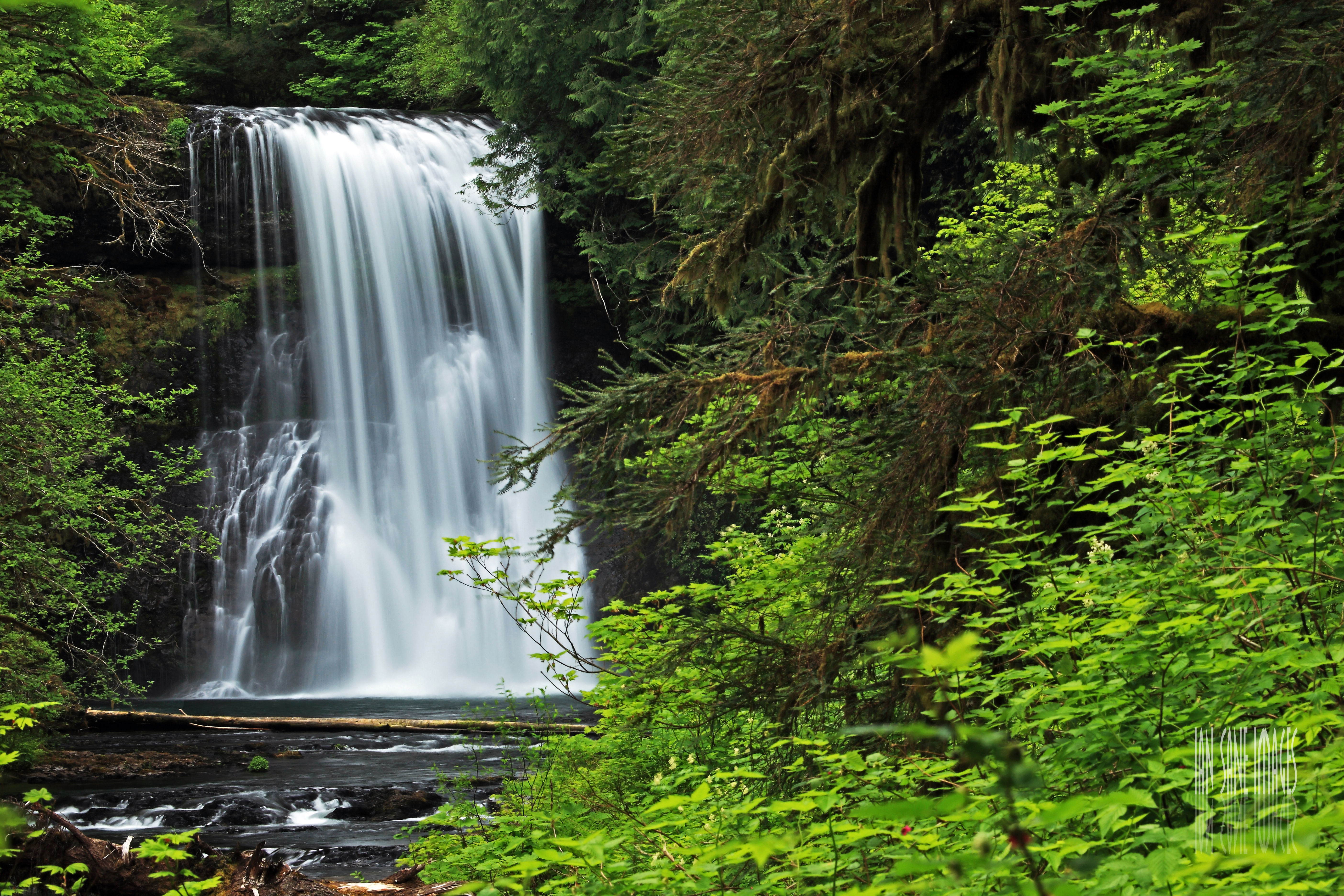 Height: 65 ft. Silver Falls State Park in Sublimity, Oregon.